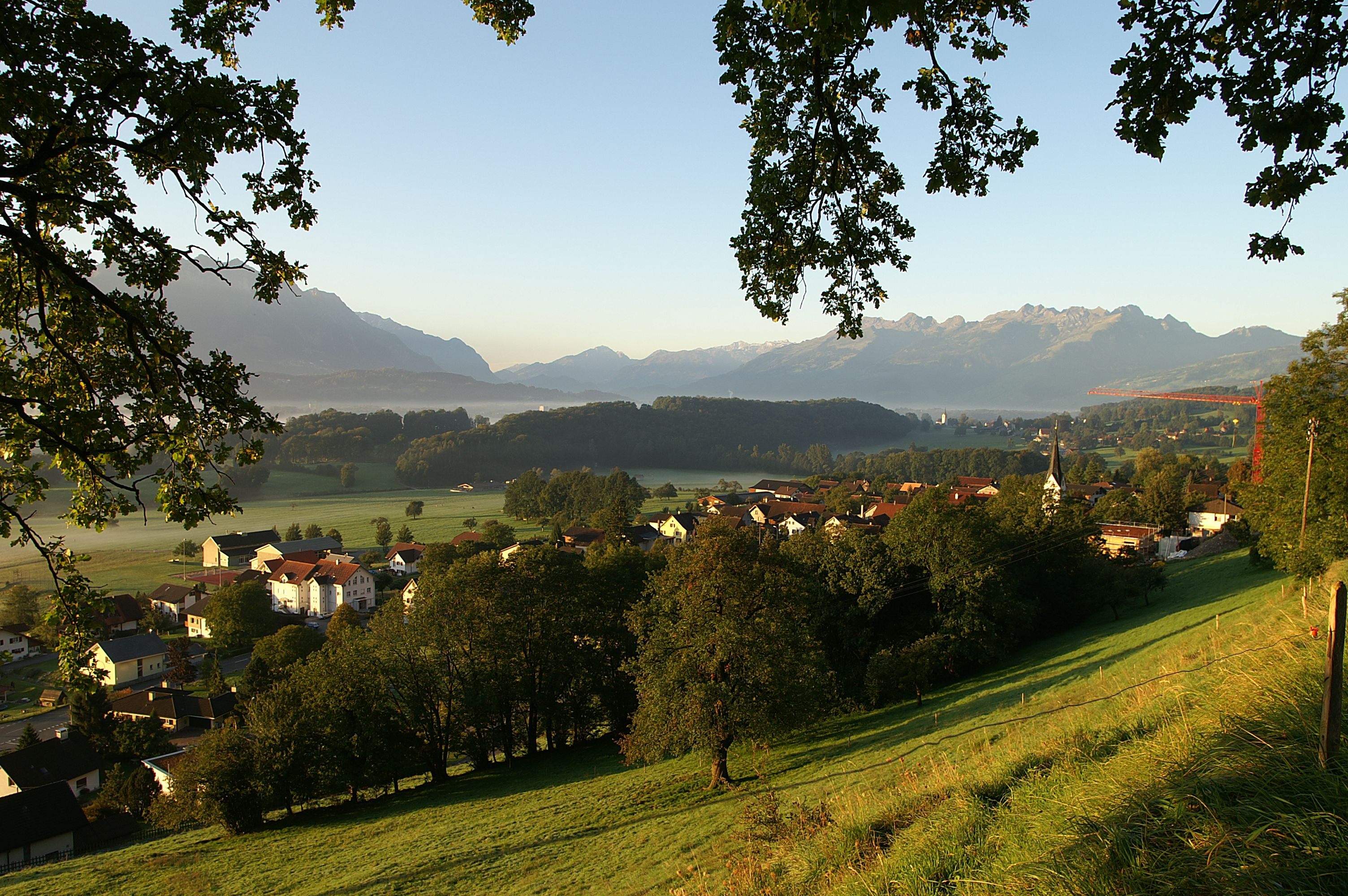 Blick oberhalb von Lienz bei Rüthi ins Rheintal, Morgennebel